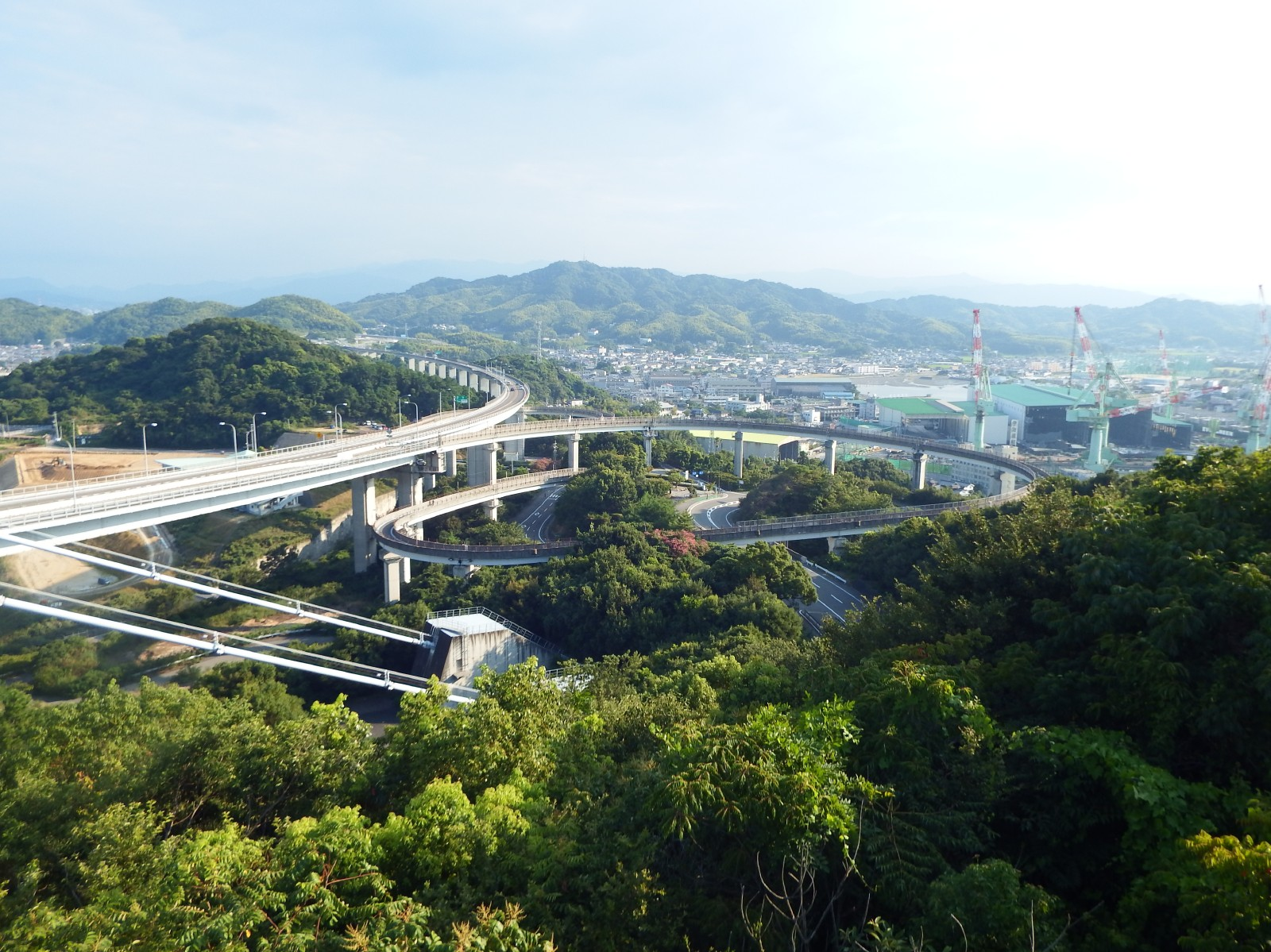 糸山展望台から南方を臨む